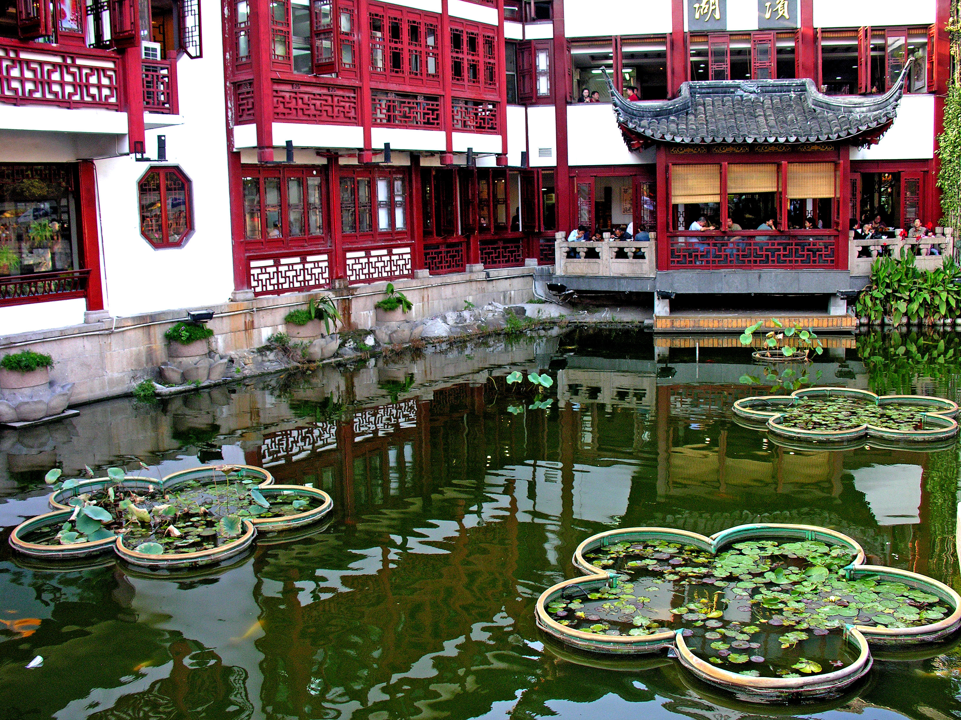 A lake beside the Mandarin Gardens Bazaar.